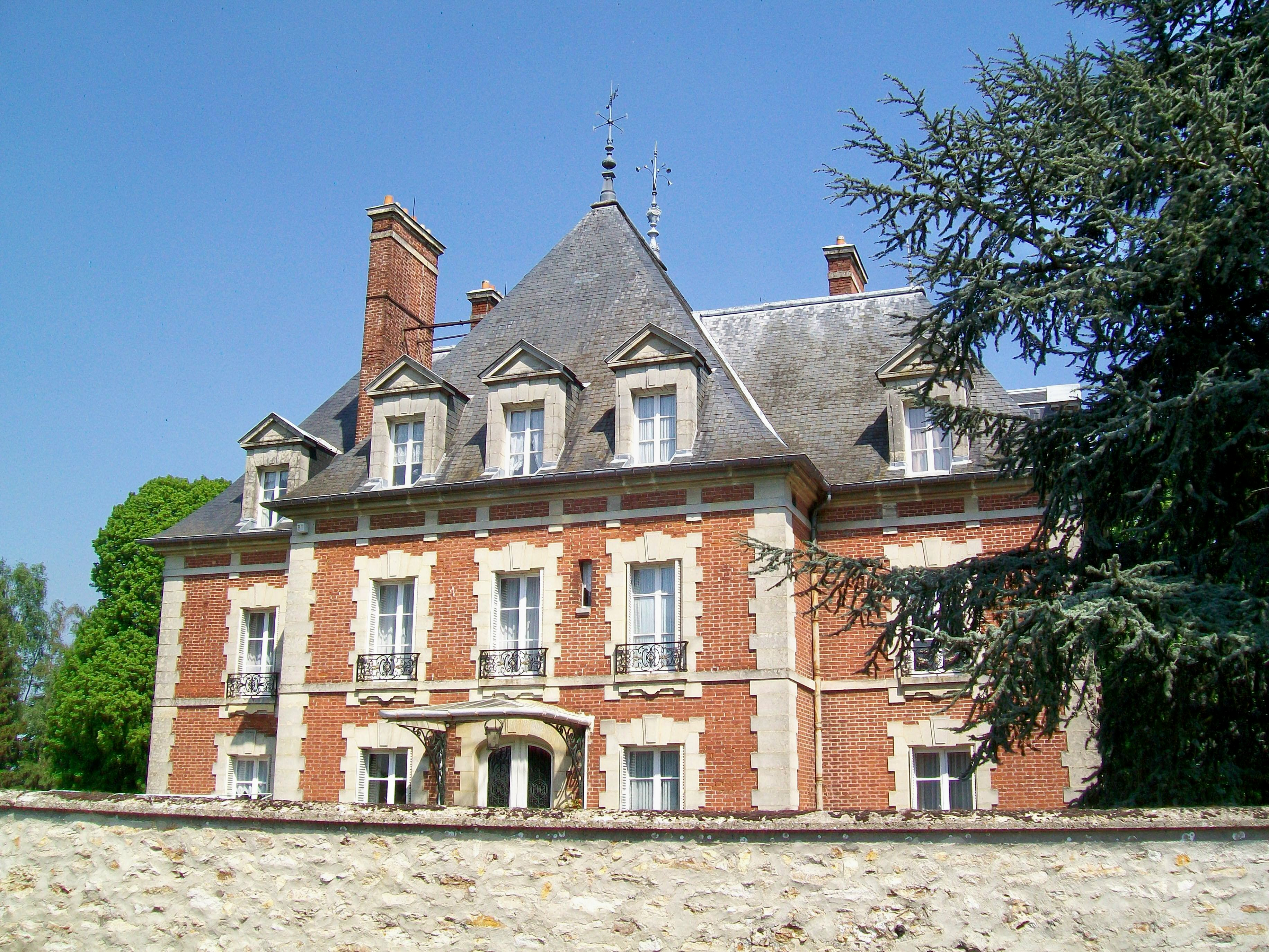 La « propriété Constant Hamet », ferronier d'art parisien qui la fit construire comme résidence secondaire à la fin du XIXe siècle, rue du Docteur Laporte / rue Constant Hamet.